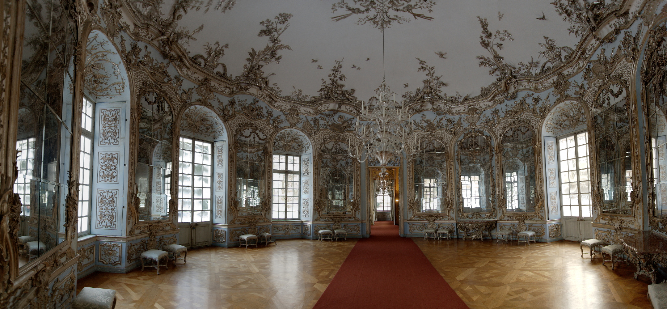 Spiegelsaal, Amalienburg, Park Schloss Nymphenburg, München, Januar 2010